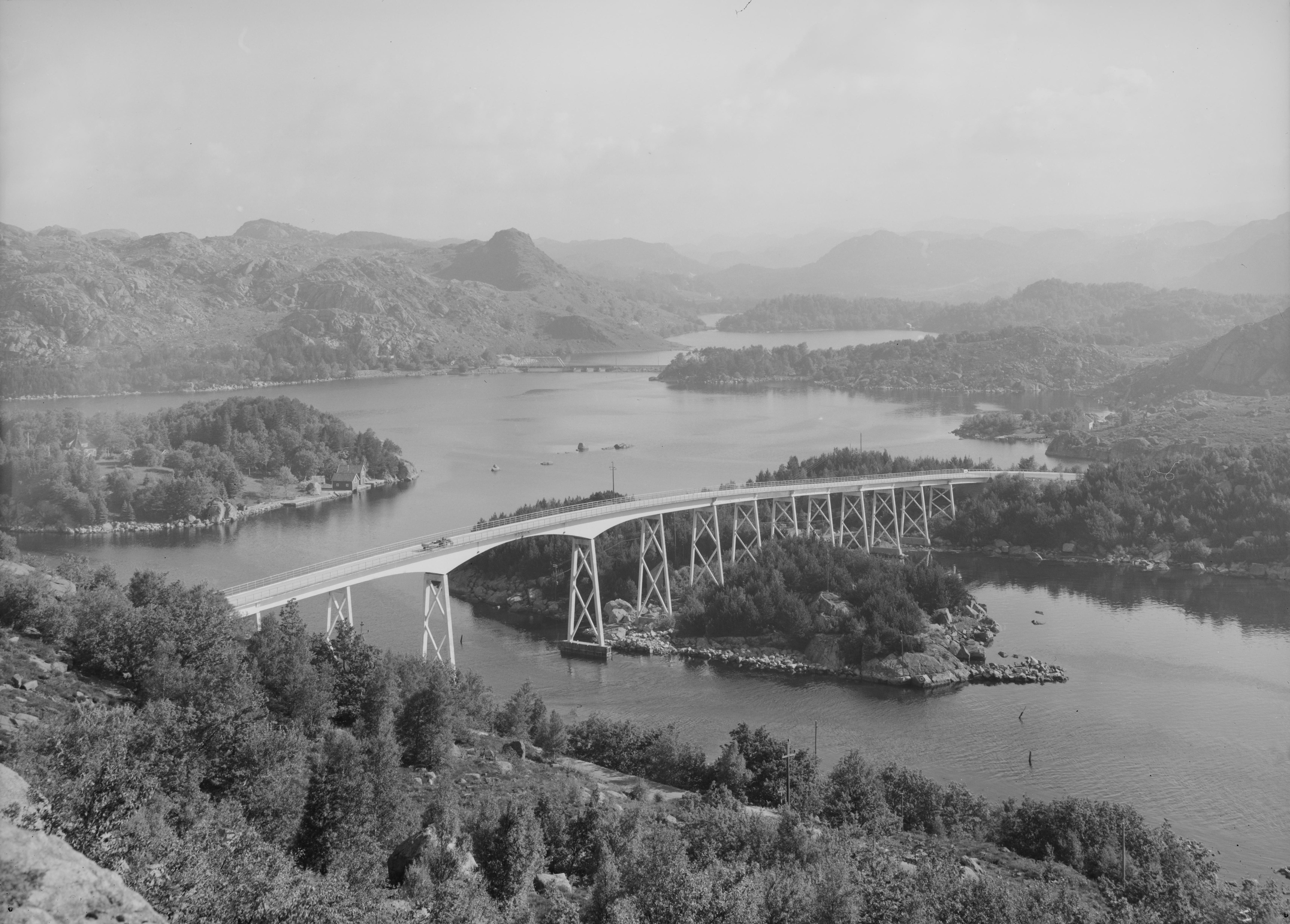 Bildet er hentet fra Nasjonalbibliotekets bildesamling. Anmerkninger til bildet var: Fotograf: ÅM Eigersund, Rogaland